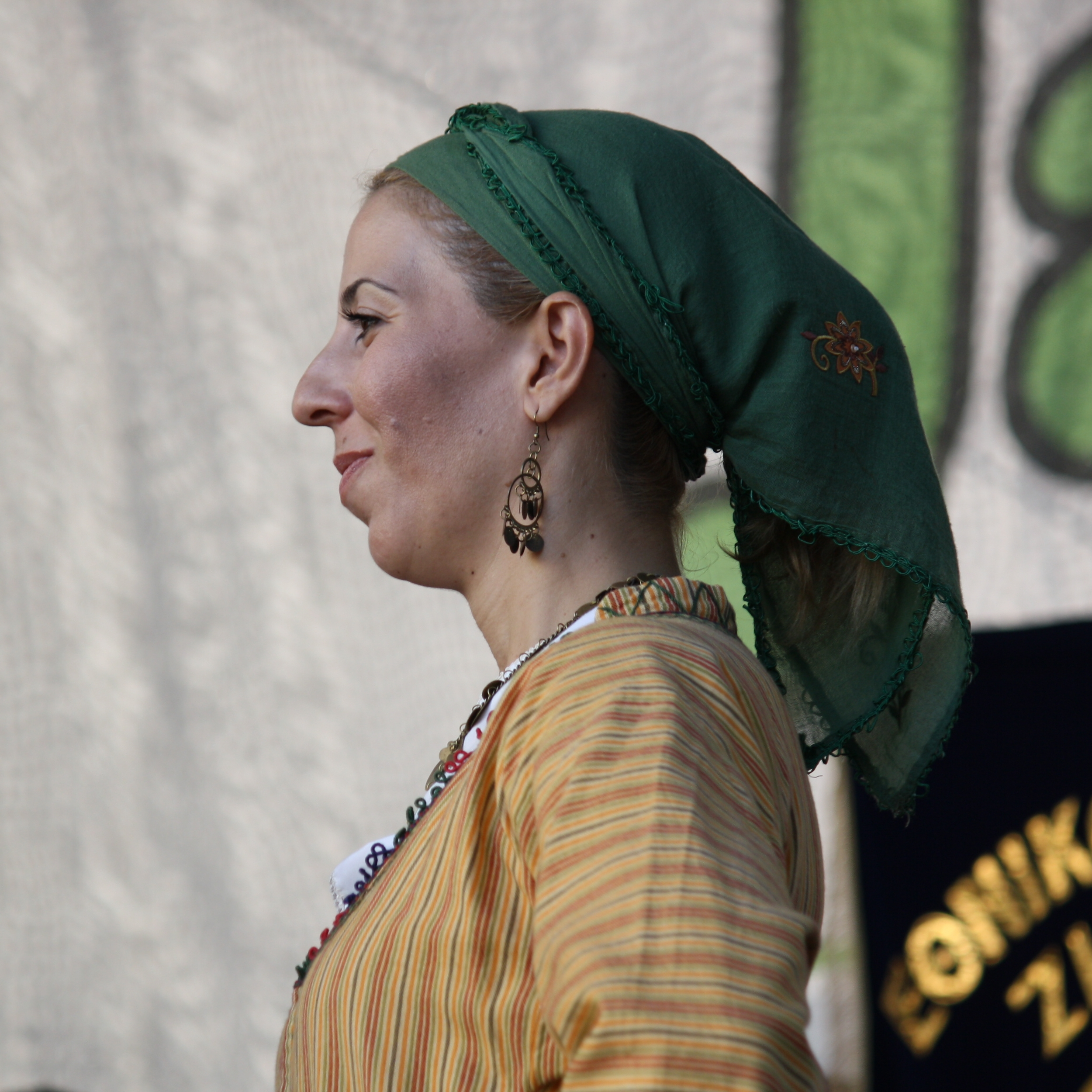 Pražský jarmark 2011 - z vystoupení kyperské folklórní skupiny Zidros